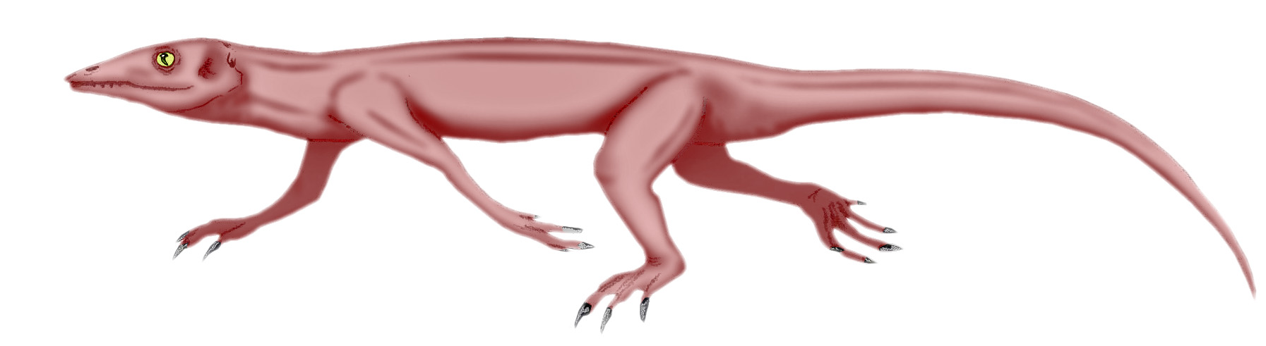 Restoration of Heleosaurus, an extinct synapsid